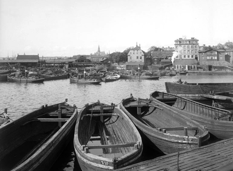 Djurgårdsstaden från Beckholmen i Stockholm ca 1900